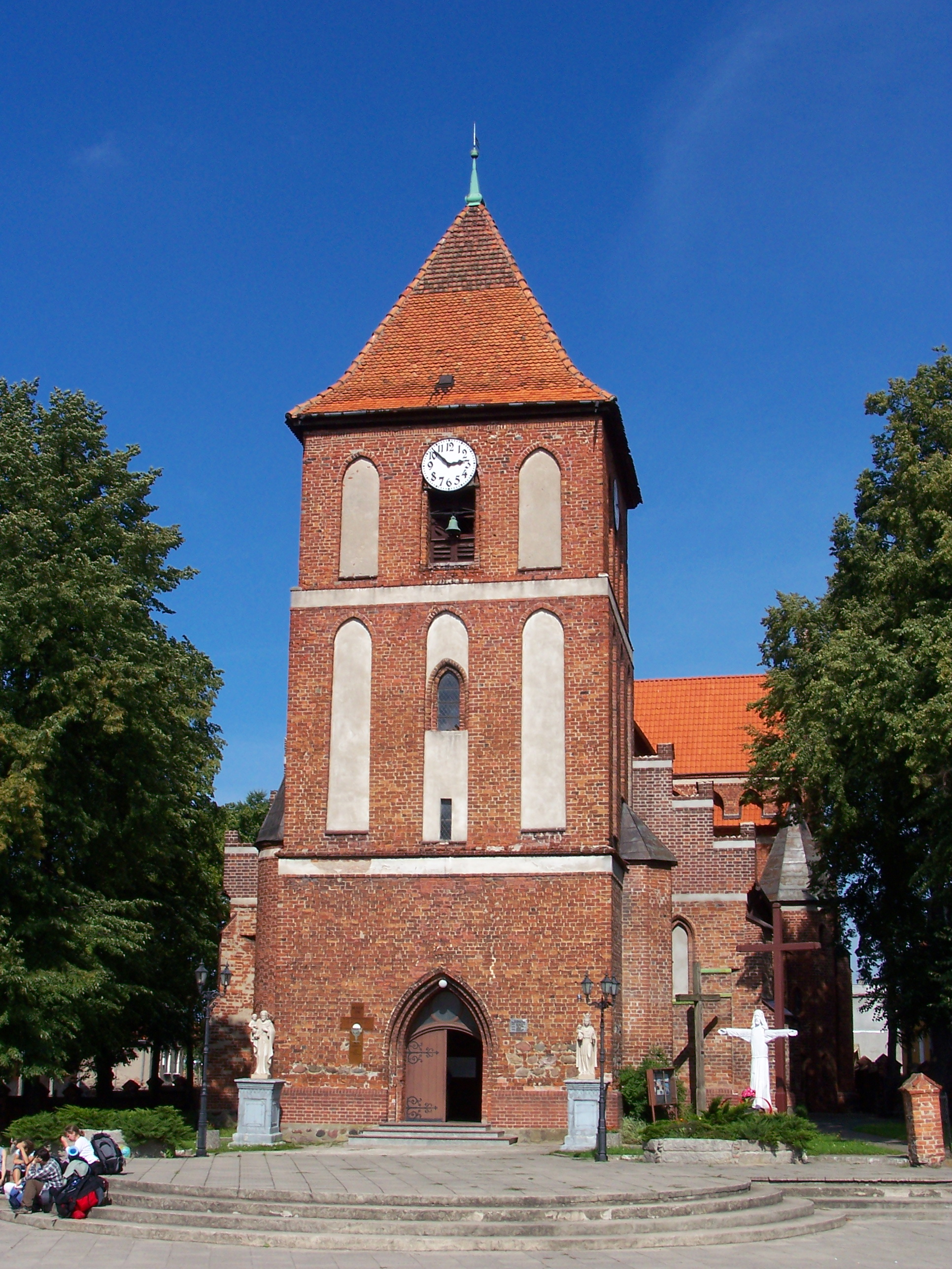 Rzymskokatolicki kościół parafialny pw. Św. Jakuba Apostoła w Tolkmicku.